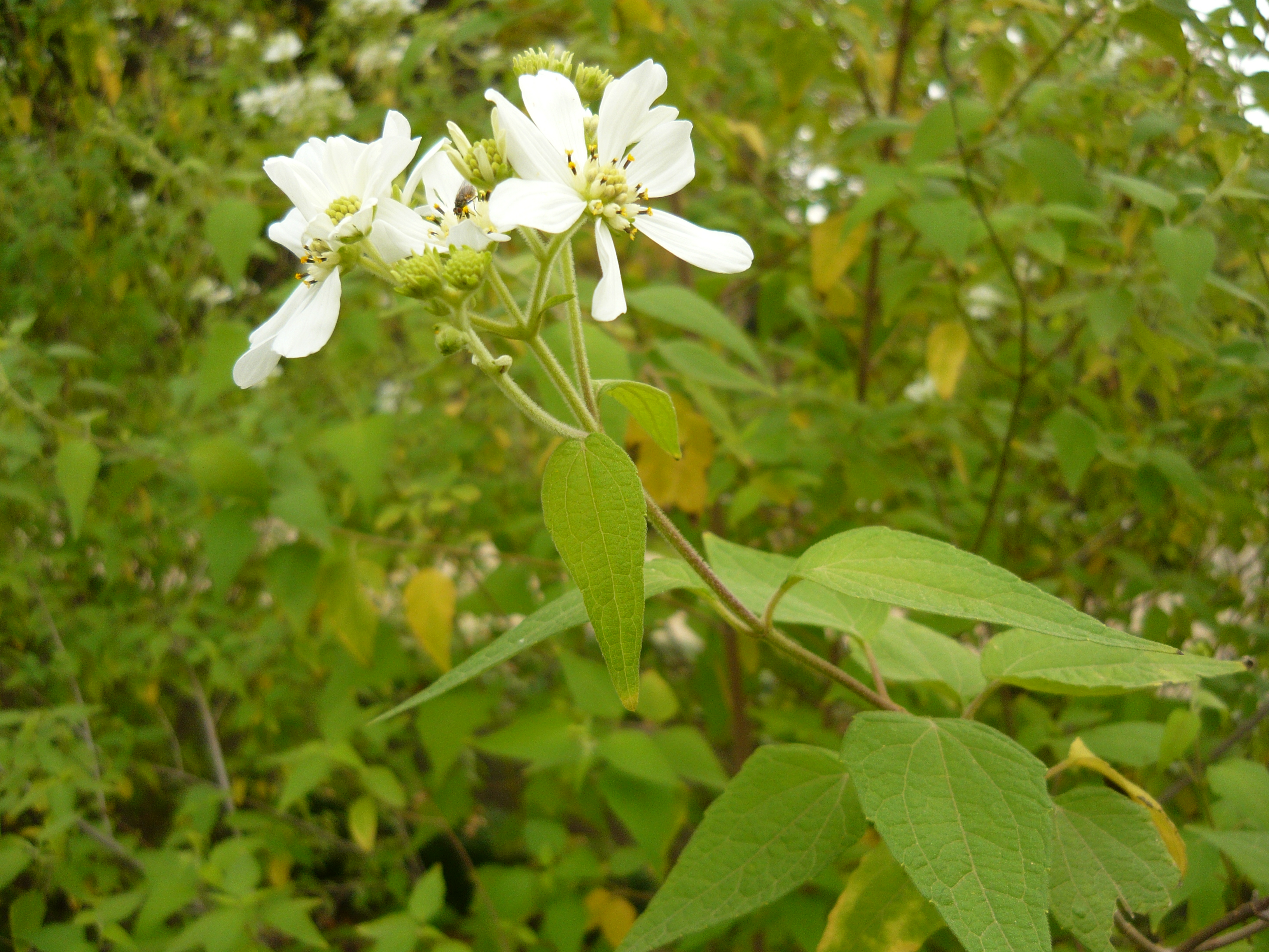 Podachaenium paniculatum. Real Jardín Botánico de Madrid